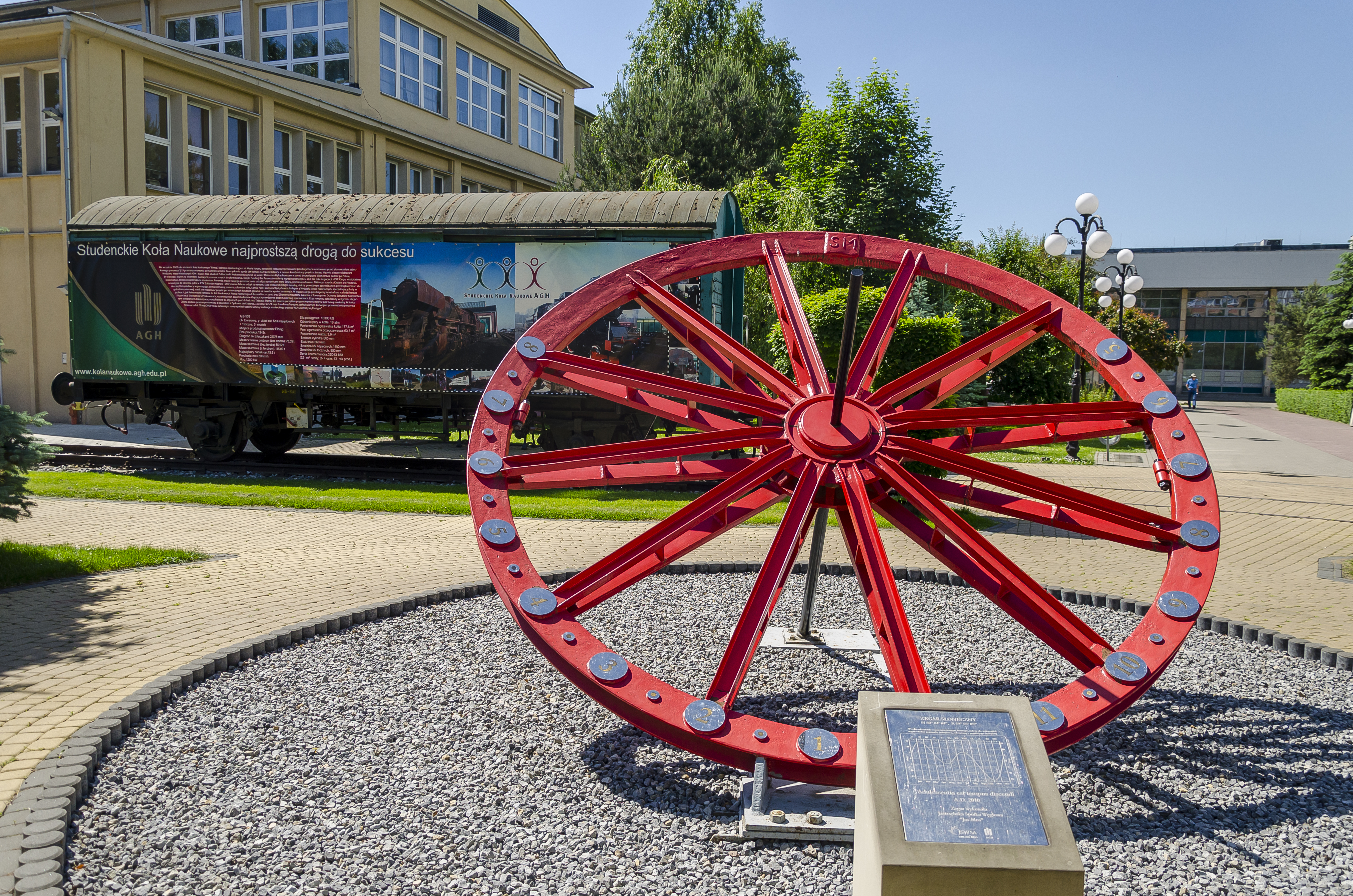 Krowodrza, Kraków, Poland